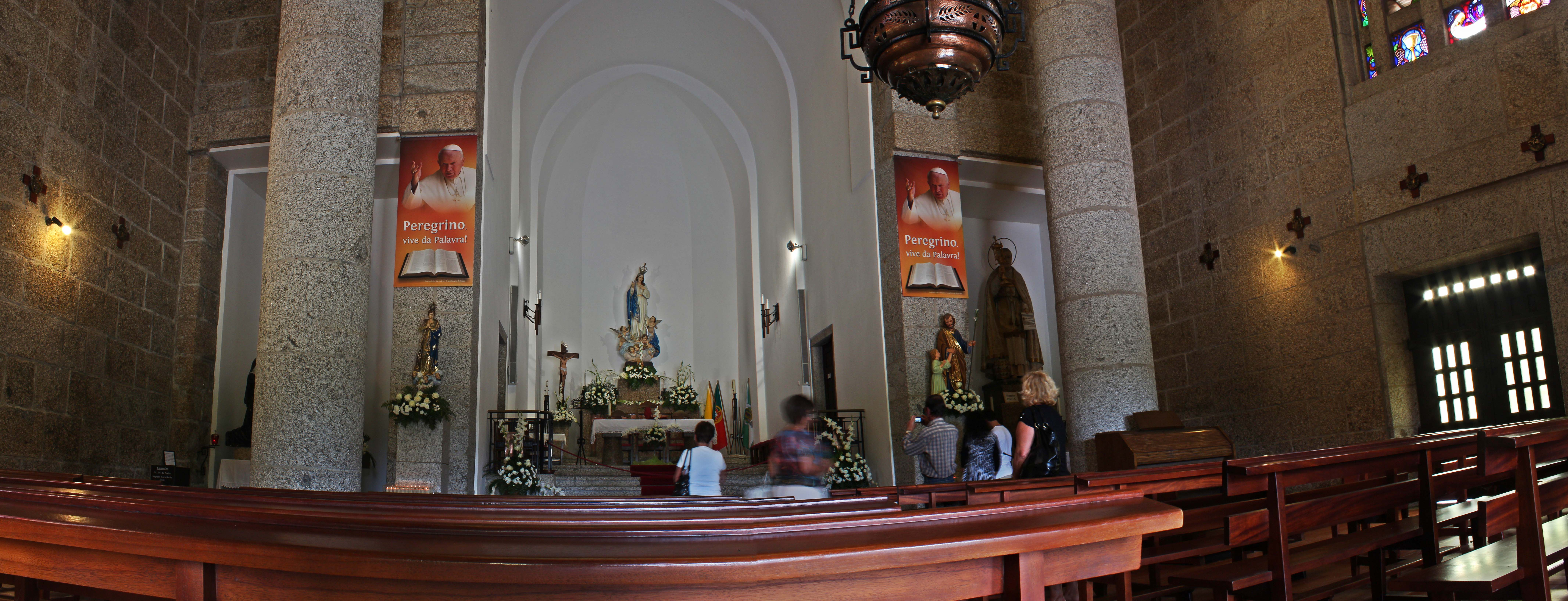 inneres der Kirche